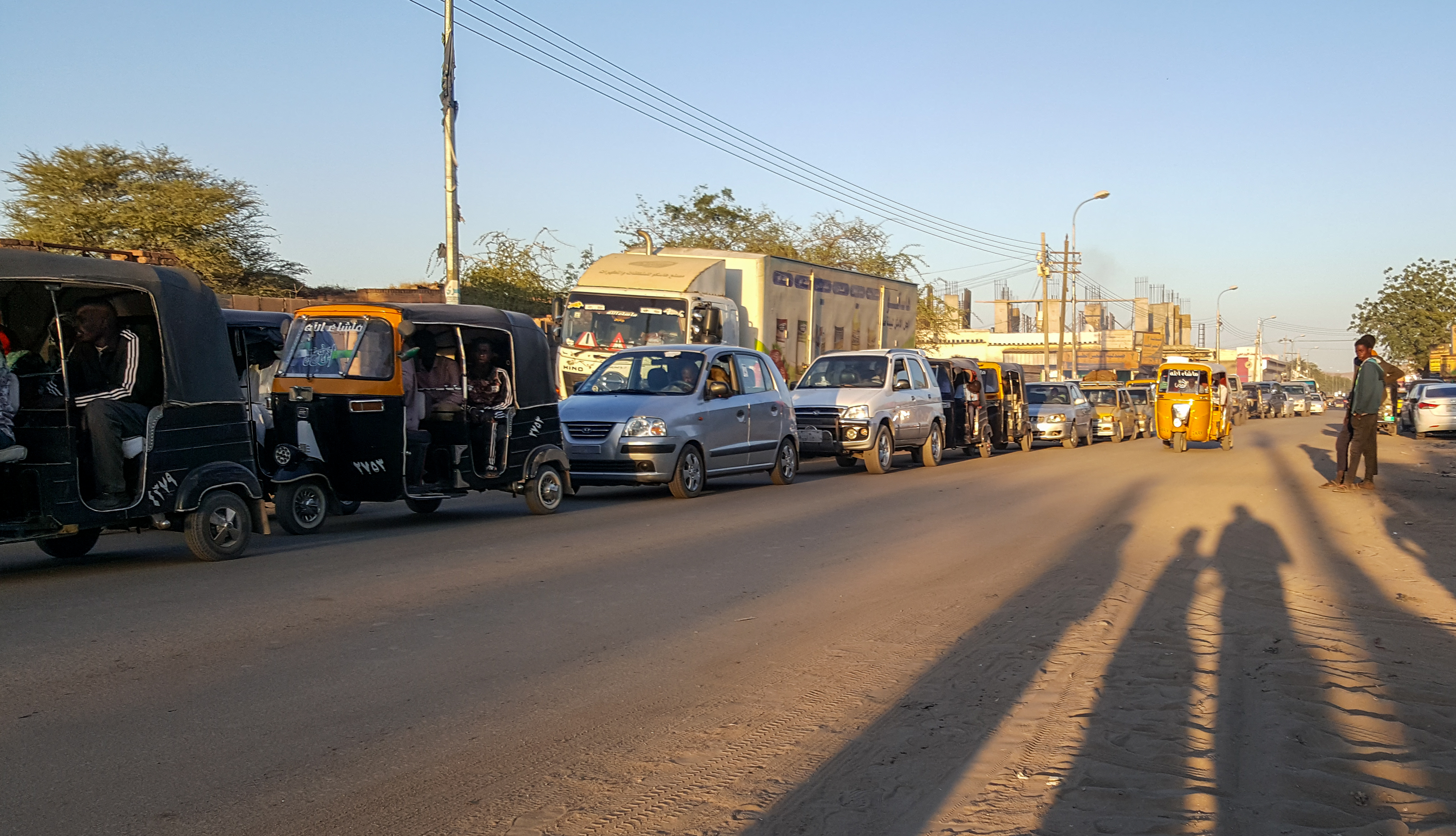 WLASudan2020 This is an image with the theme "Africa on the Move or Transport" from: Sudan